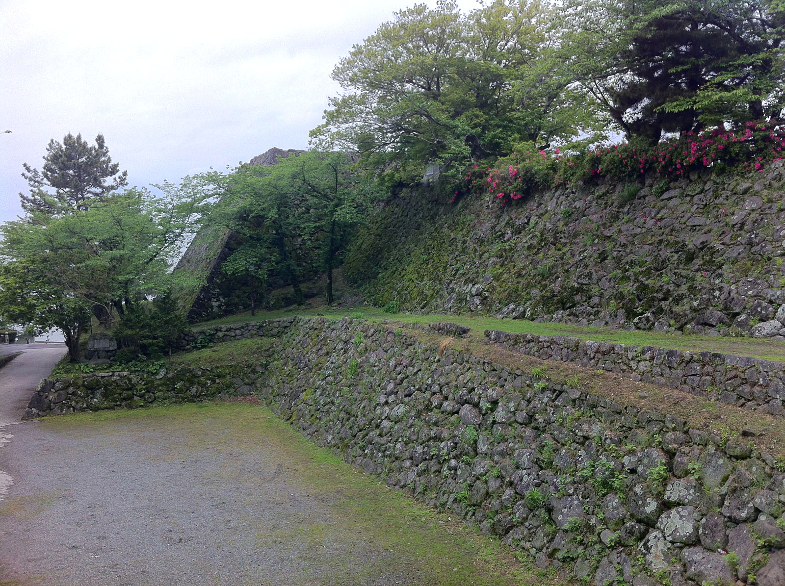 日出城天主跡（大分県速見郡日出町）